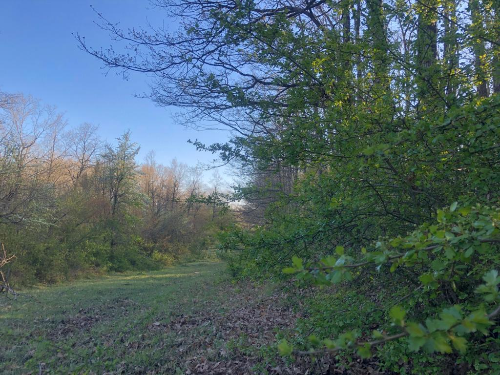 Bosco al altofusto (Bella, Basilicata)